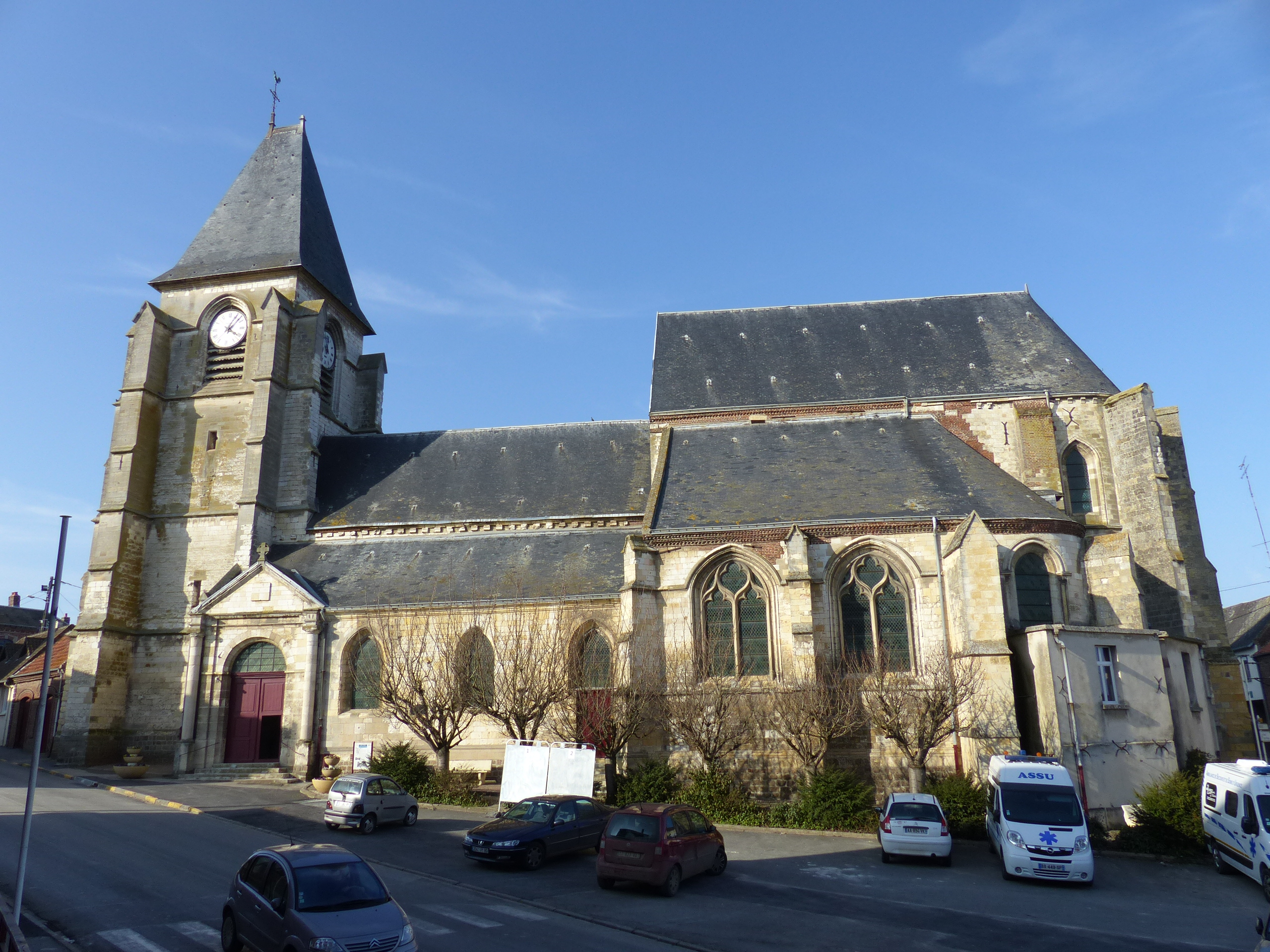 Eglise Saint-Nicolas de Bray-sur-Somme